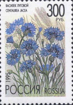 Почтовая марка России